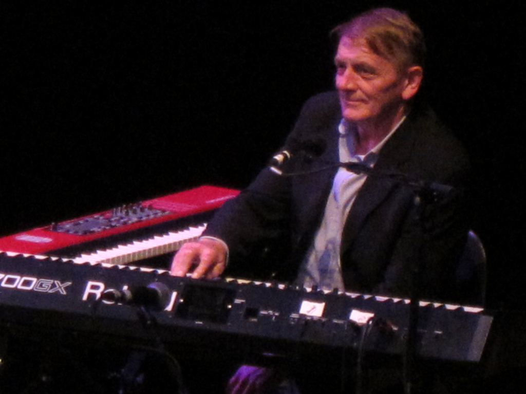 Geraint Watkins.